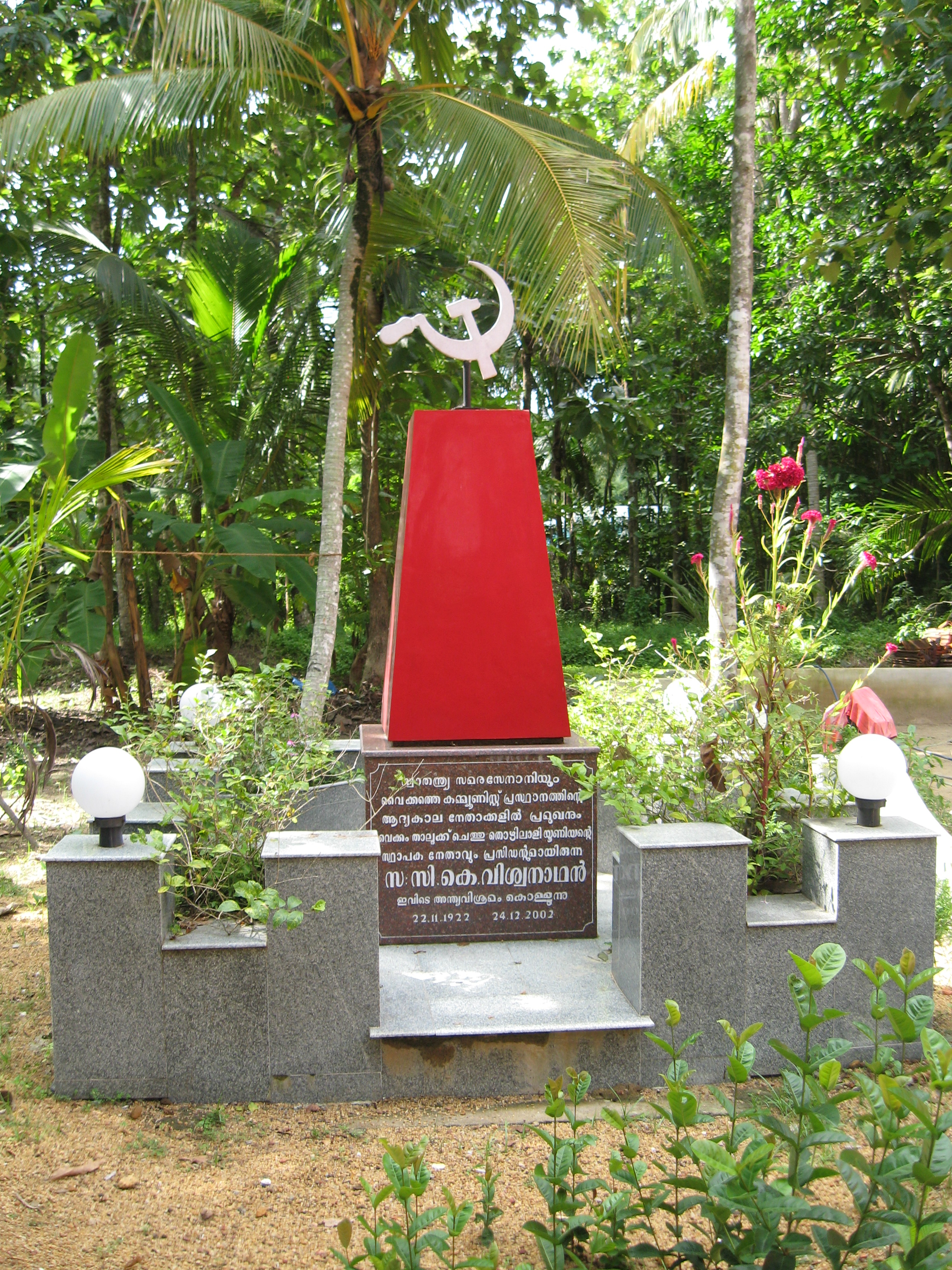 വൈക്കത്തെ ഇണ്ടംതുരുത്തി മനയ്ക്കു മുൻപിൽ സി.പി.ഐ. നേതാവ് സി.കെ.വിശ്വനാഥന്റെ സംസ്കാരസ്ഥാനം